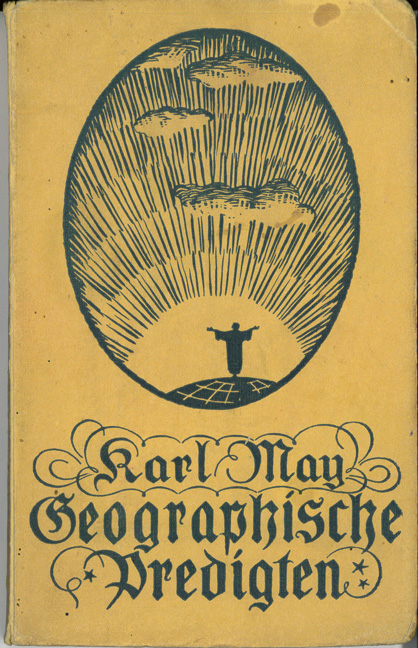 Geographische Predigten